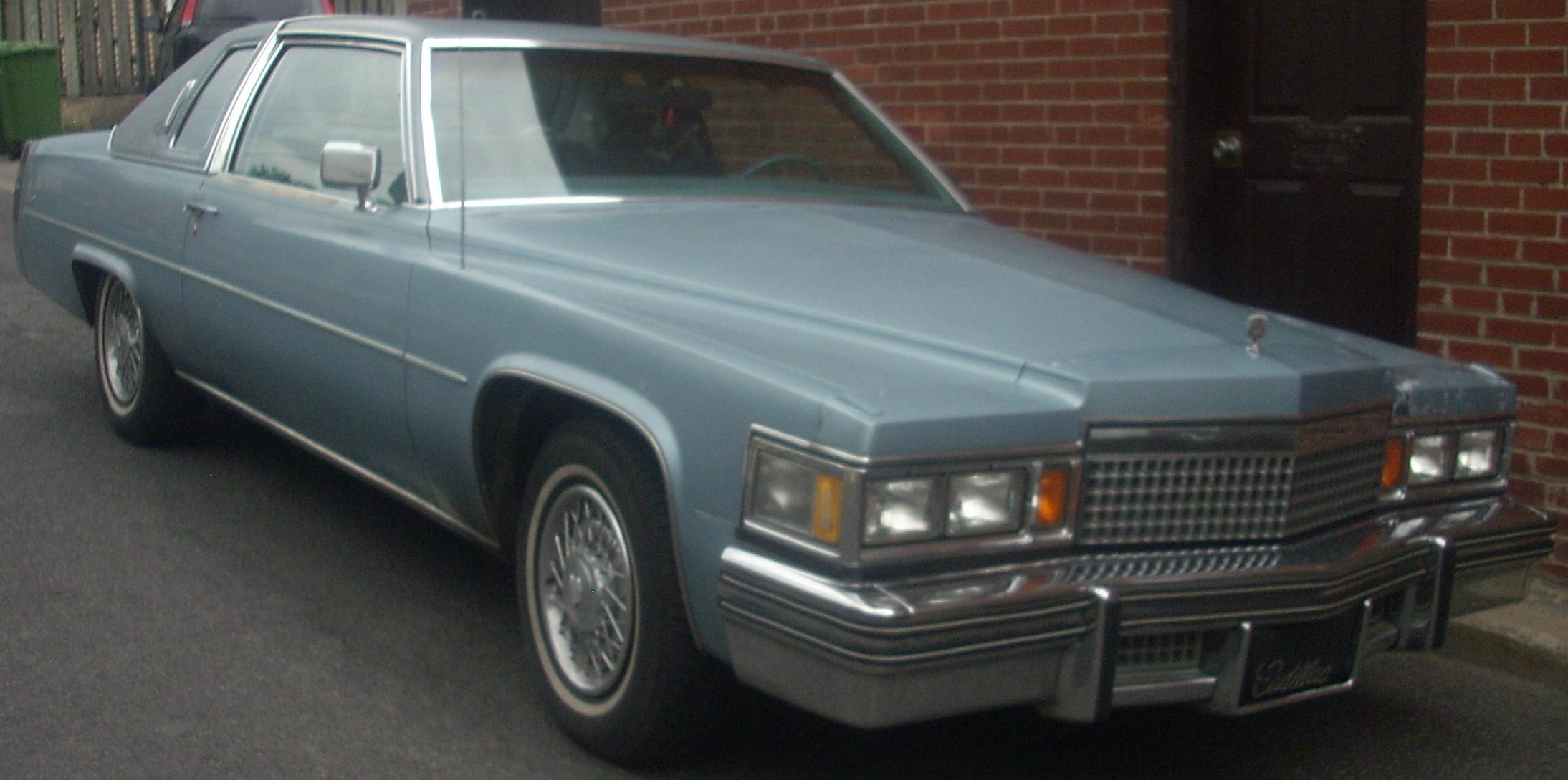 Cadillac Coupe de Ville photographed in Ste. Anne De Bellevue, Quebec, Canada.